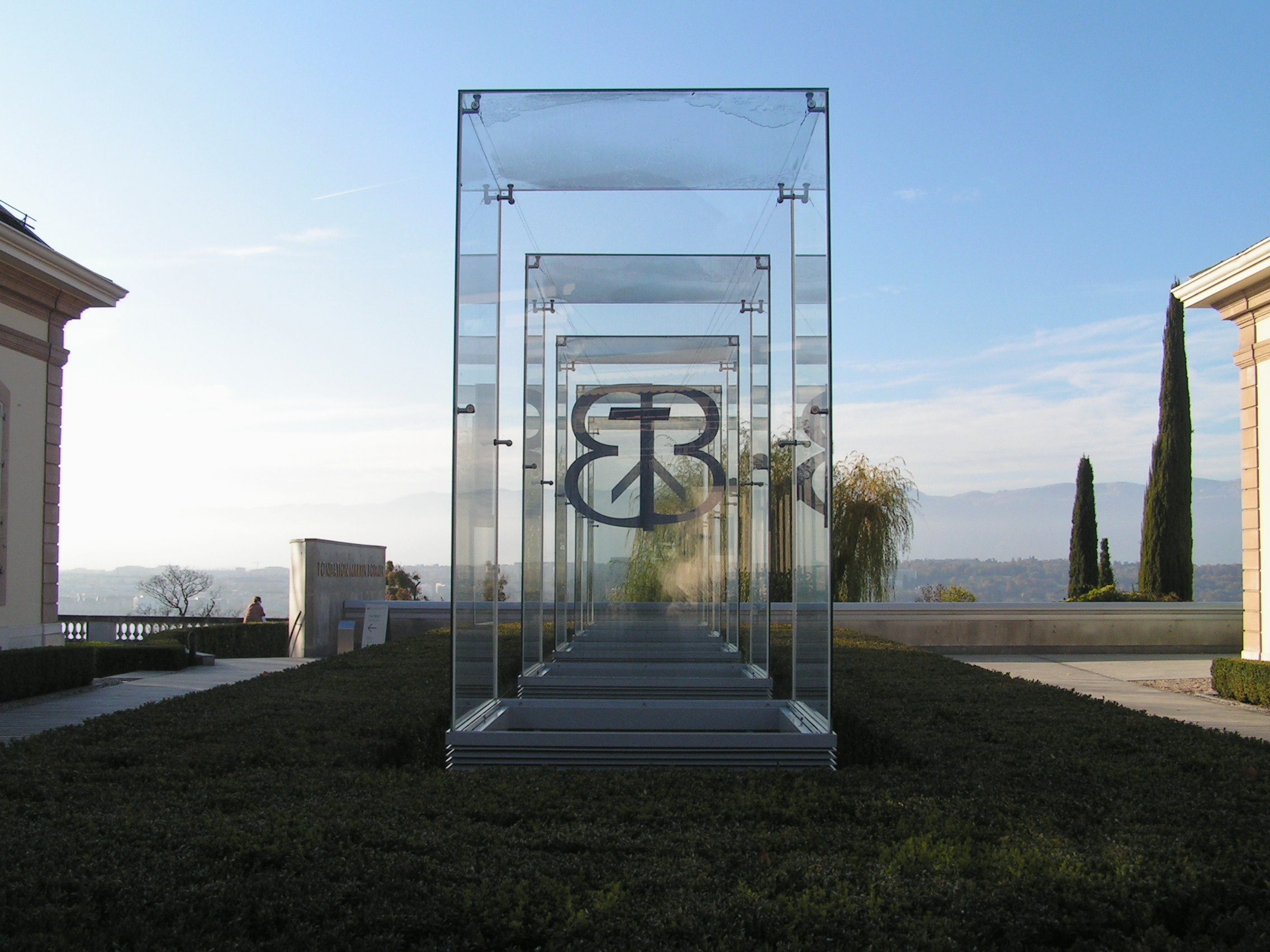 Fondation Martin Bodmer à Cologny, Genève